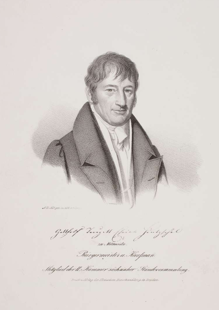 Kaufmann u. Bürgermeister zu Mittweida, Abgeordneter der Zweiten Kammer der sächs. Ständeversammlung 1833/34., 1779-1848